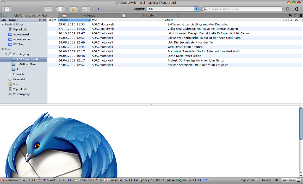 Bildschirmfoto Mozilla Thunderbird 3 mit alternativem Thema und Erweiterungen, OS: Ubuntu 9.04